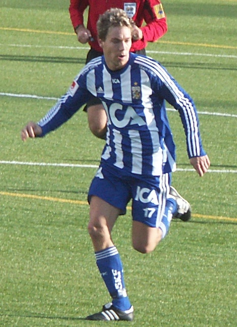 Daniel Alexandersson of IFK Göteborg in a friendlie match against Lillestrøm at Backavallen in Göteborg, March 28th, 2009.